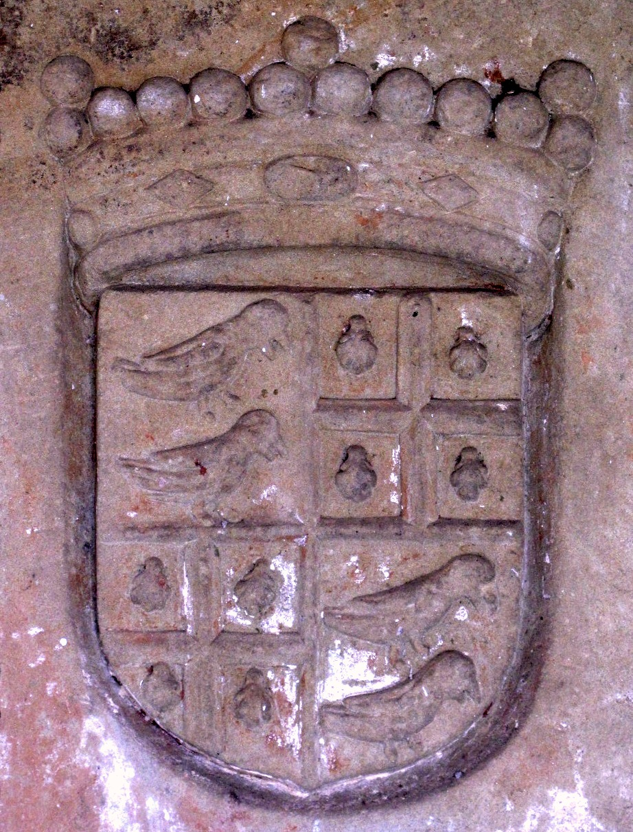 Wappen Cob von Nüdingen (1699), in der Kirche Niederweis (Kreis Bitburg-Prüm)